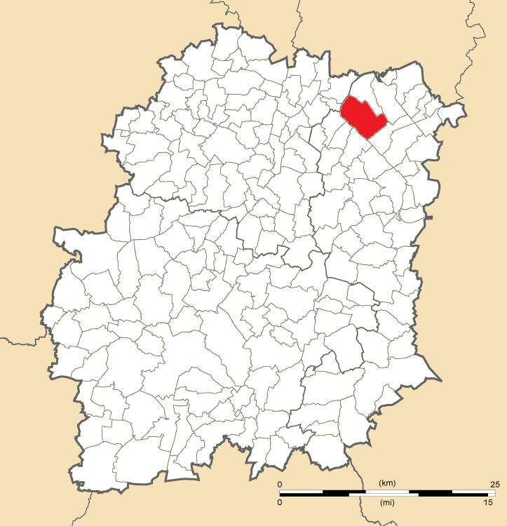 Carte de position de Draveil en Essonne